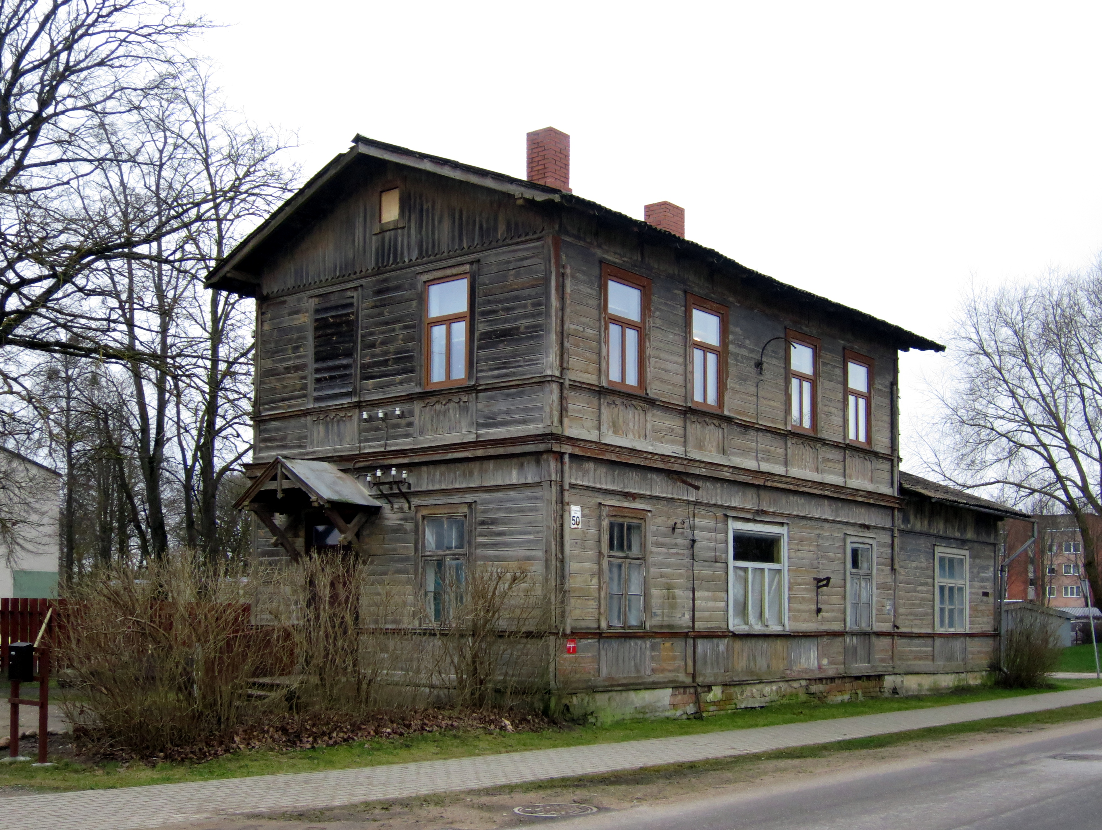 Grobiņas stacijas ēka